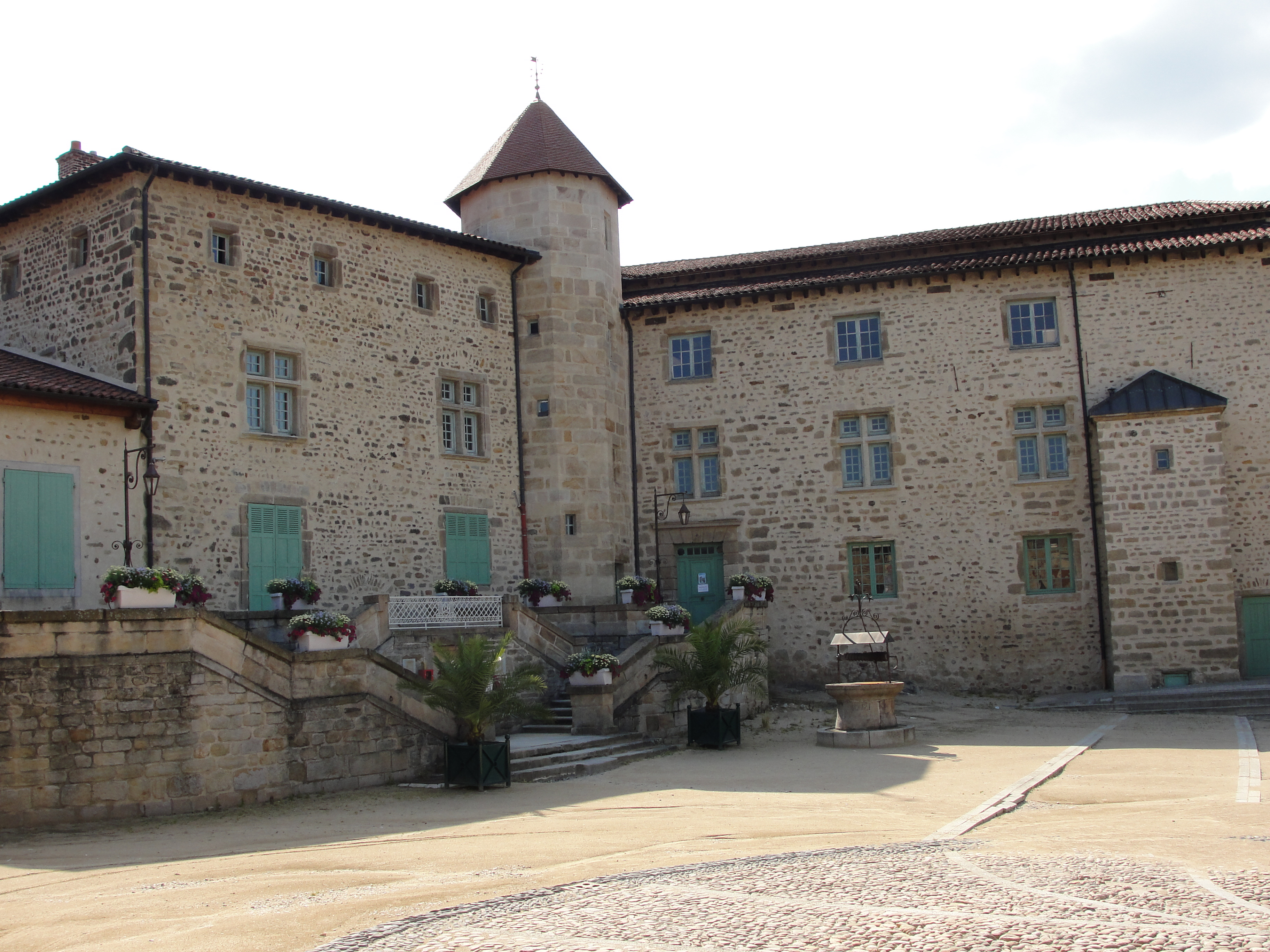 Cour intérieure du château de Roche la Molière (Loire).